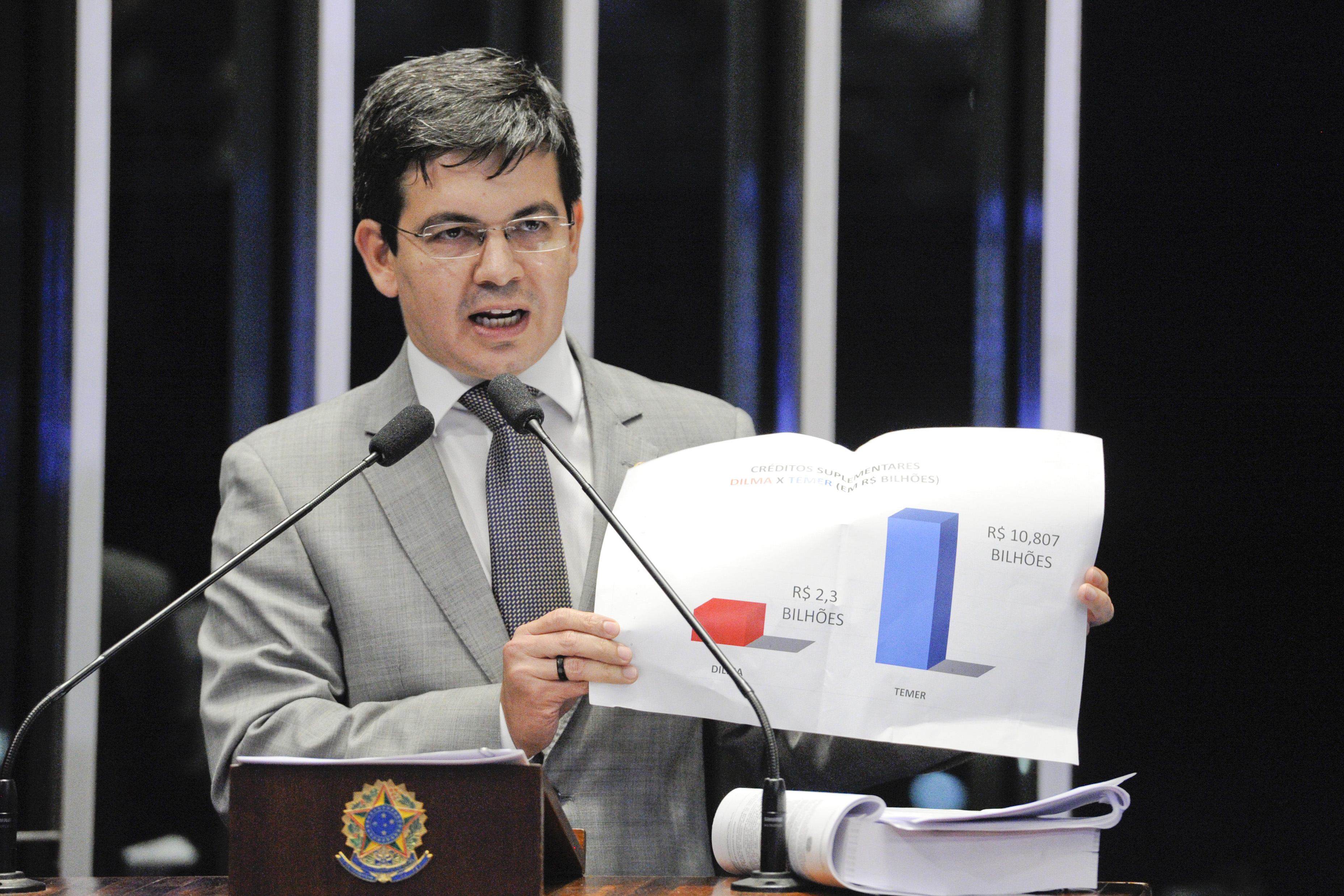 Sessão deliberativa extraordinária destinada a discussão do Parecer nº 726, de 2016, que analisa a procedência ou improcedência da Denúncia nº 1, de 2016, referente ao processo de impeachment da presidente Dilma Rousseff. Em discurso, senador Randolfe Rodrigues (Rede-AP) exibe gráfico comparativo Dilma x Temer sobre créditos suplementares. Foto: Edilson Rodrigues/Agência Senado